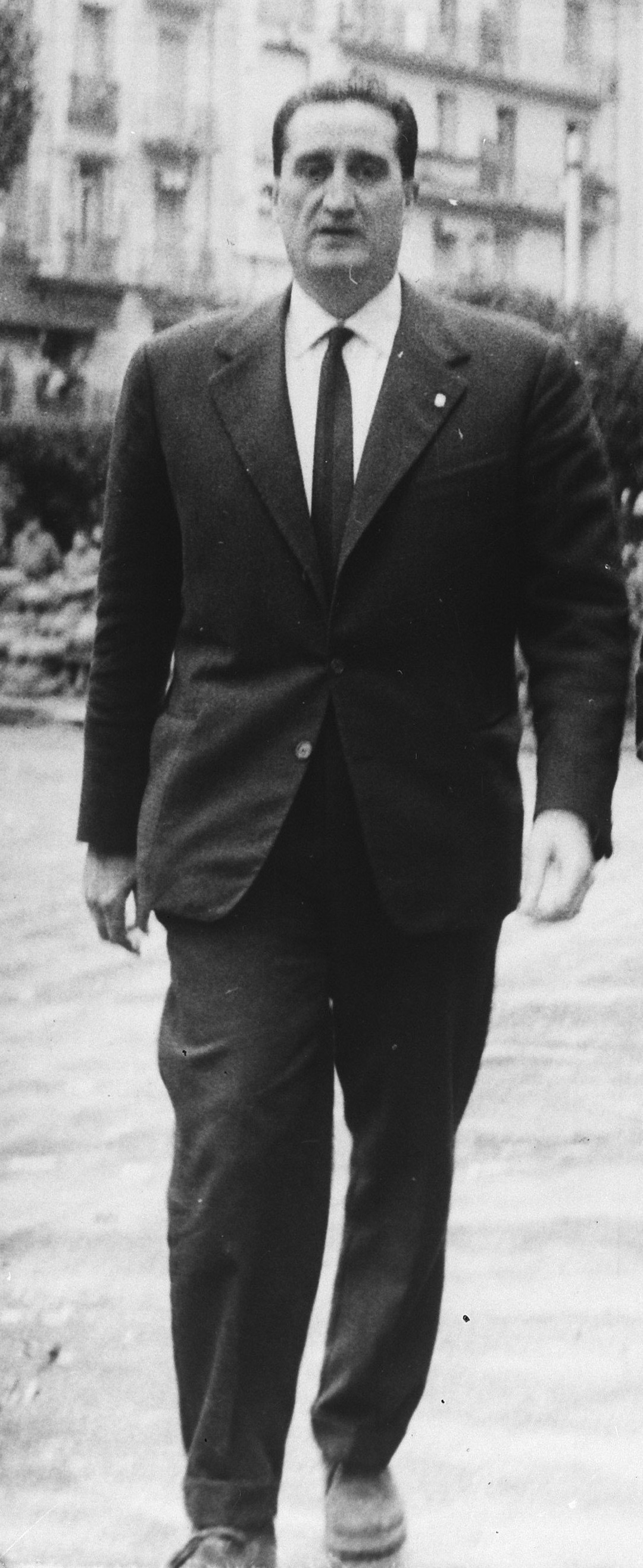 Proces inzake Algerijns oproer, Ortiz (according to [1], which looks accurate)